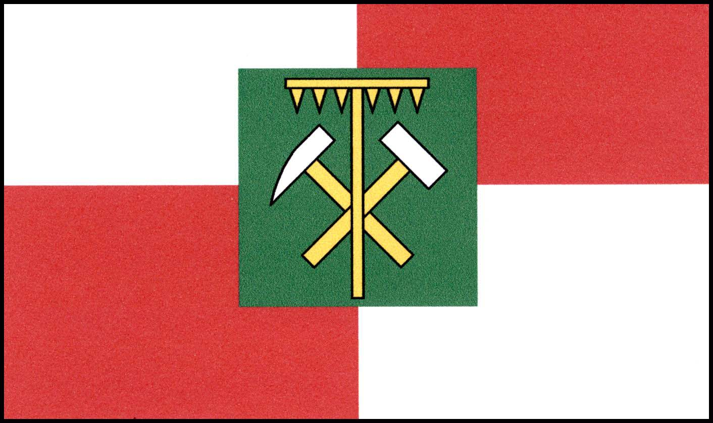 Vlajka obce Horní Slavkov